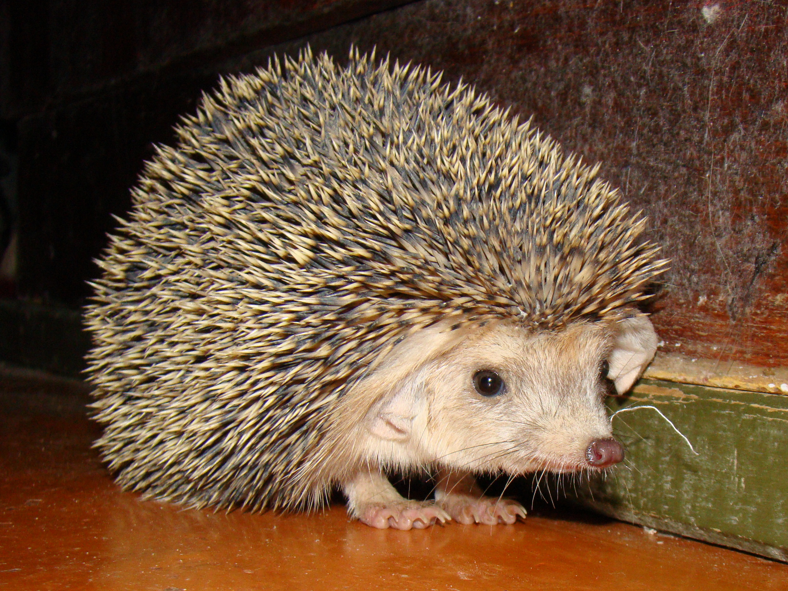 Ушастый ёж (Hemiechinus auritus). Город Байконур, Кызылординская область, Казахстан